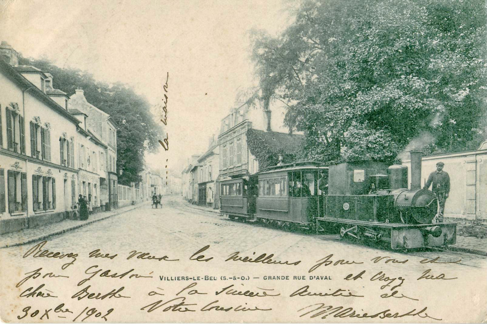 Carte postale ancienne éditée par A. Bréger VILLIERS-LE-BEL : Grande rue d'Aval Vue en gros plan du tramway de Villiers-le-Bel